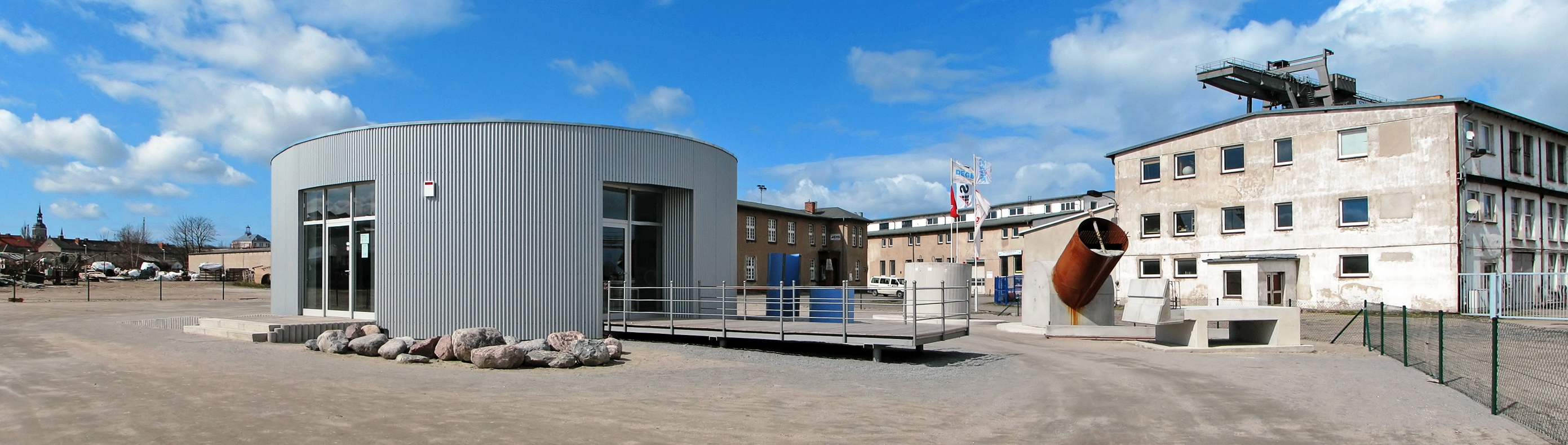 Beschreibung: Pyloneum in Stralsund am Fuße der neuen Strelasundbrücke Fotograf: Darkone, 14. April 2006